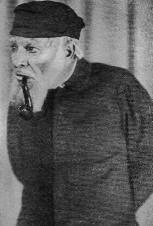 השחקן בצלאל לונדון כ"חייל ניקולאייבי" בהצגת "חוזרים בתשובה" תיאטרון המטאטא 1938